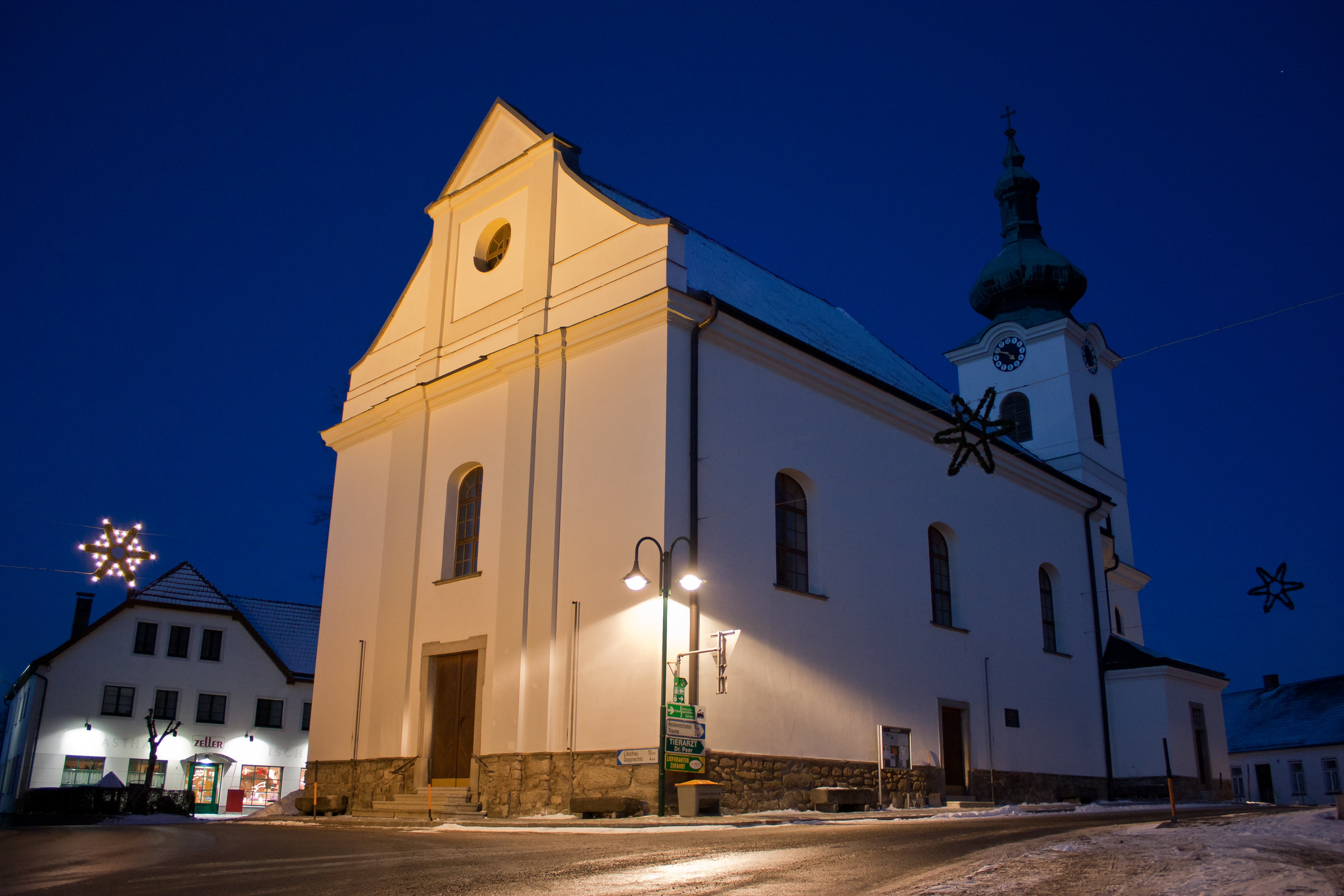 Kath. Pfarrkirche Hl. Andreas in Brand